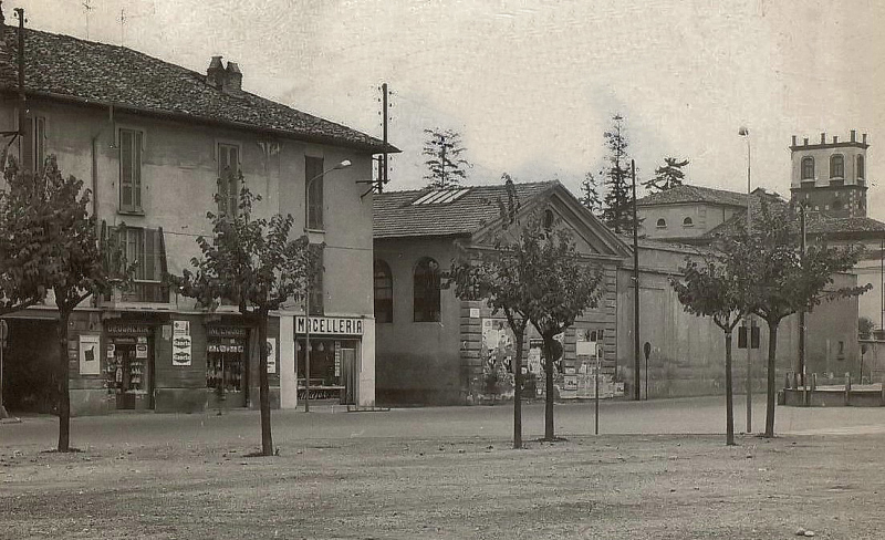 L'ALEA in piazza Gramsci, a Cinisello Balsamo